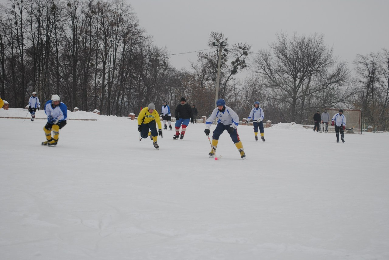 Чемпіонат України 2015